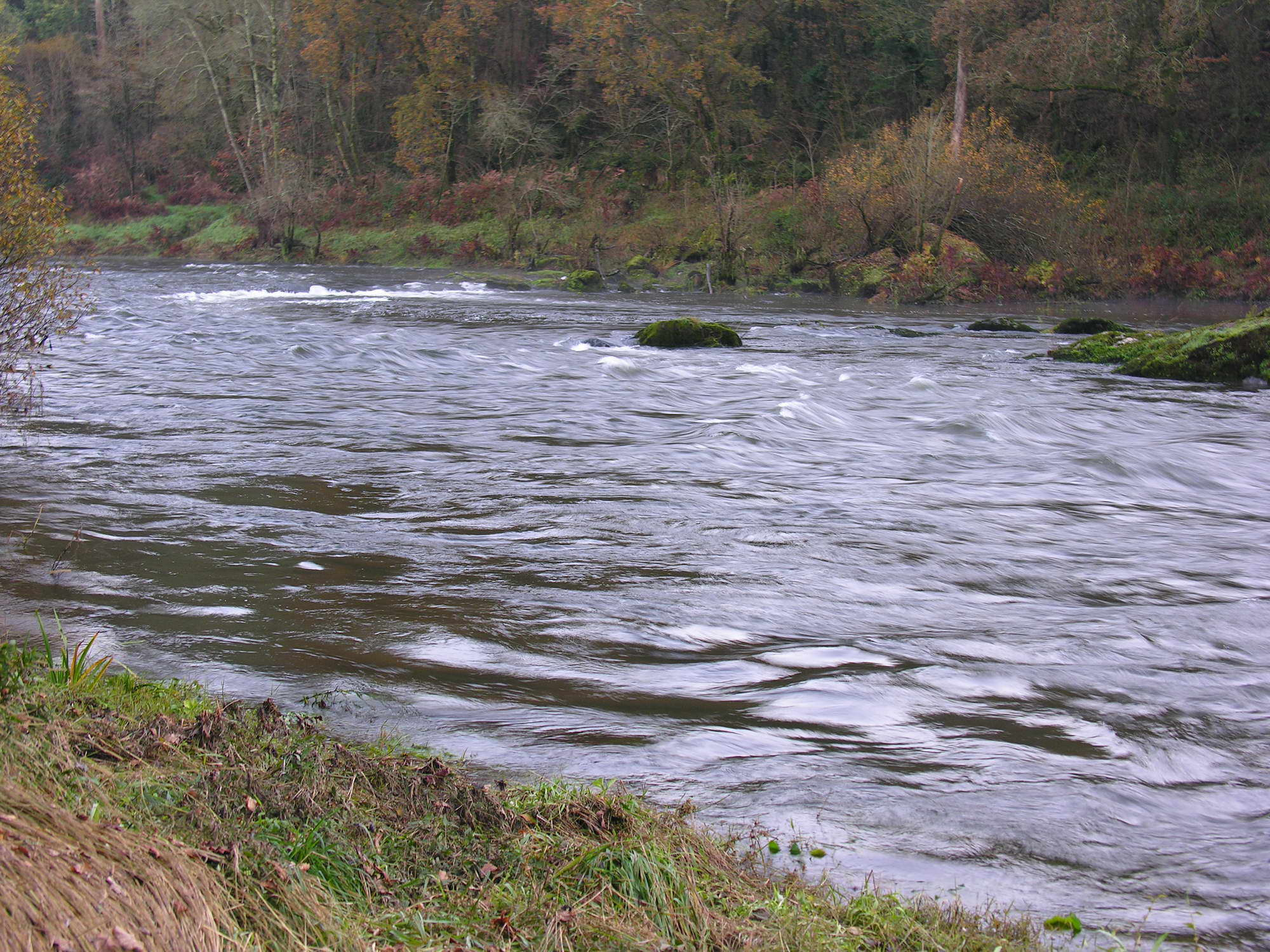 self made. Río Ulla, Xirimbao, Galicia, Spain